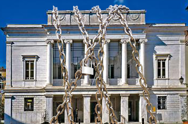 Immagine satirica sulla chiusura del Teatro Animosi